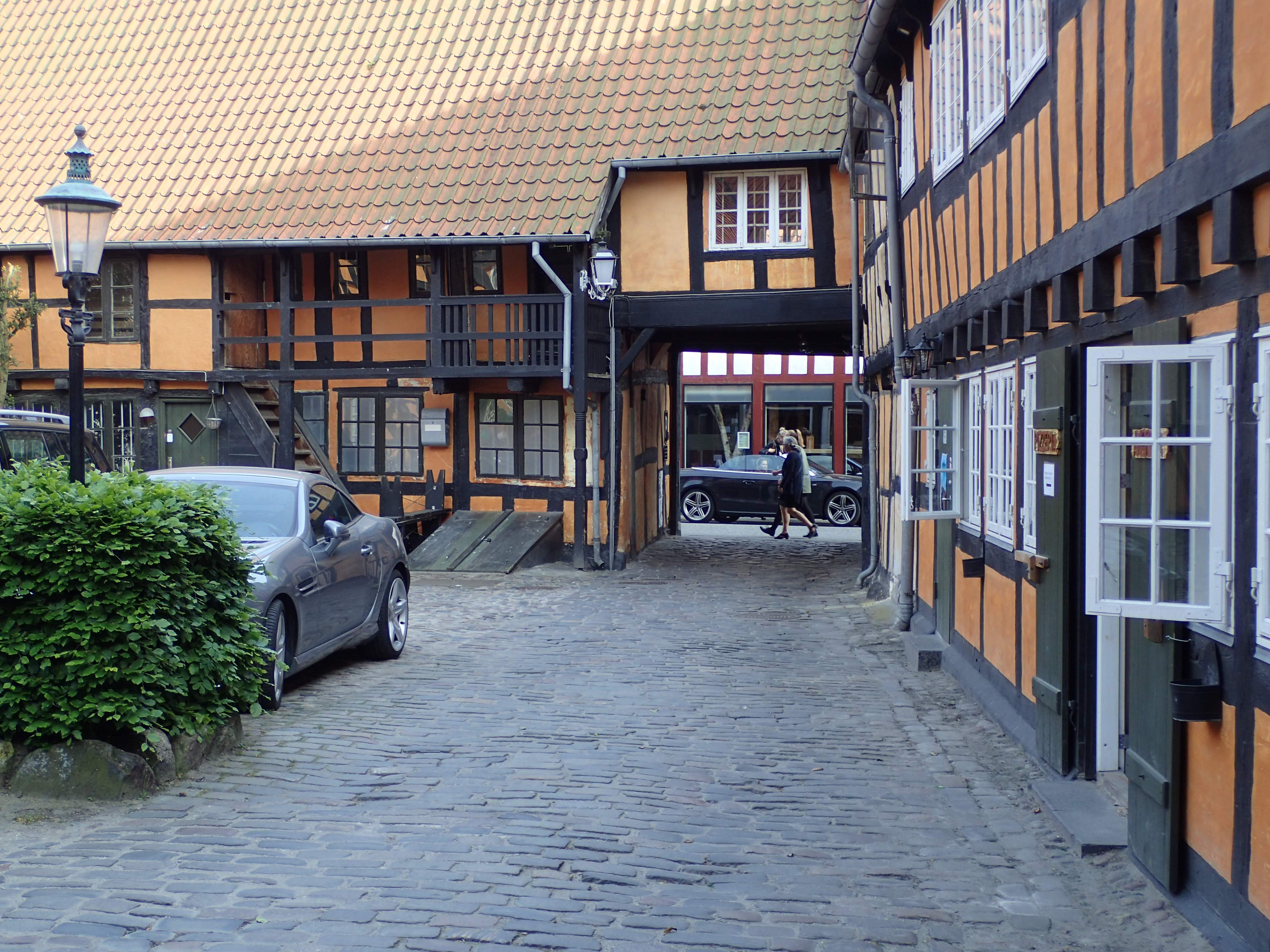 Gården i Vestergade 58